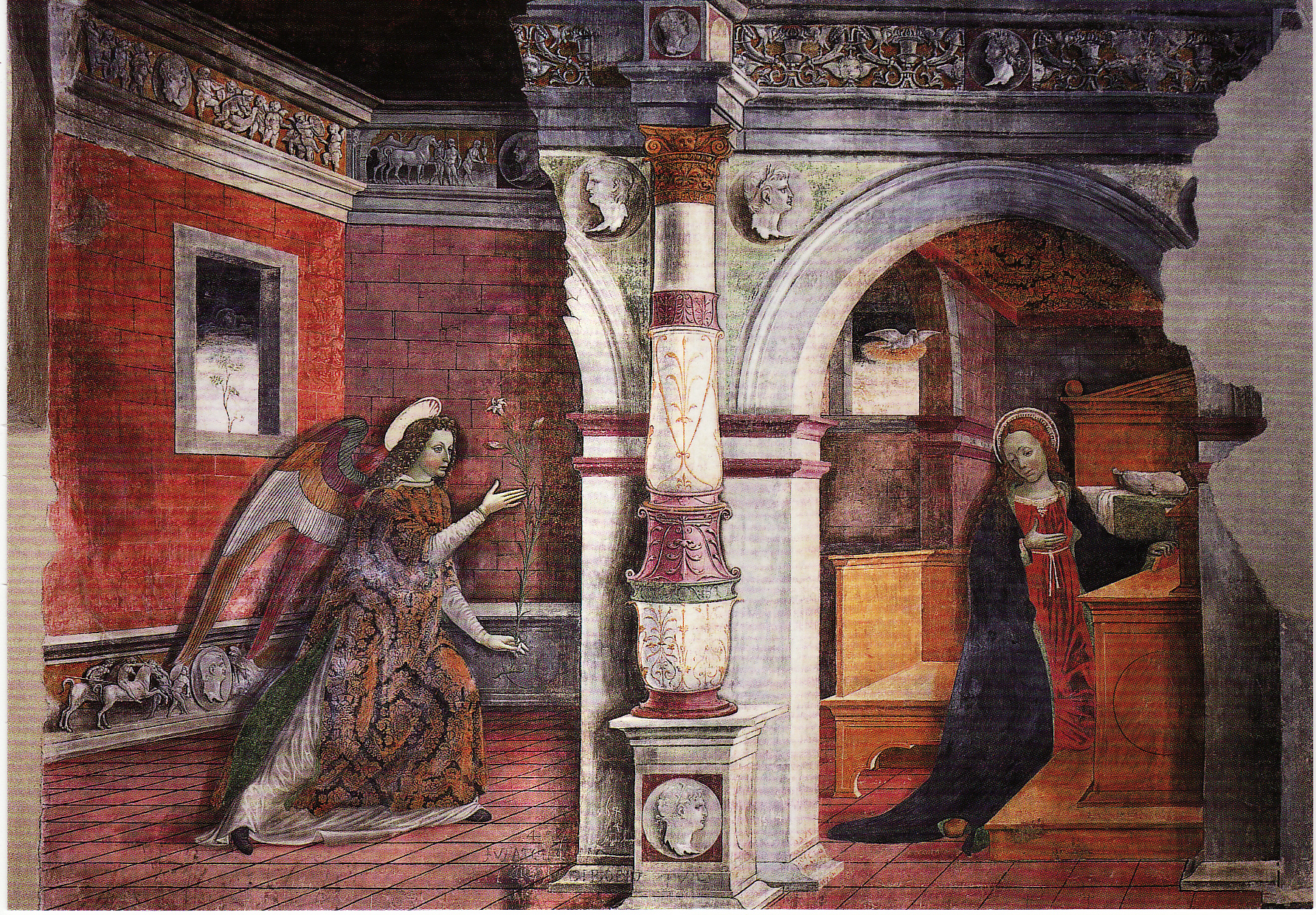 opera propria, stampa, affresco Annunciazione, licenza libera